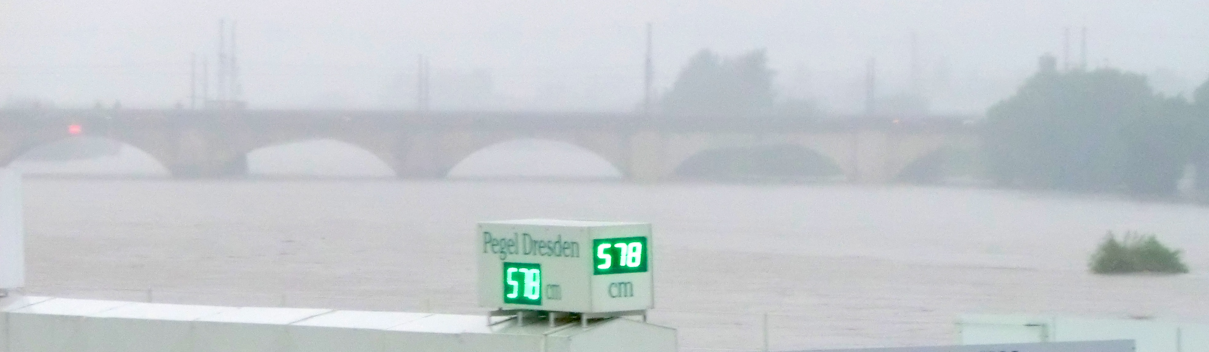 Pegel Dresden 02.06.2013 gegen 20:00 Uhr